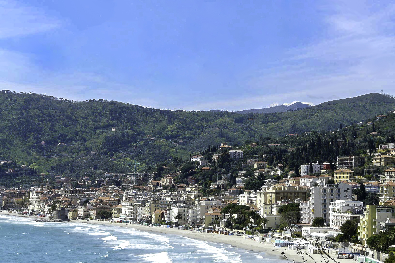 Alassio, Liguria, Italia